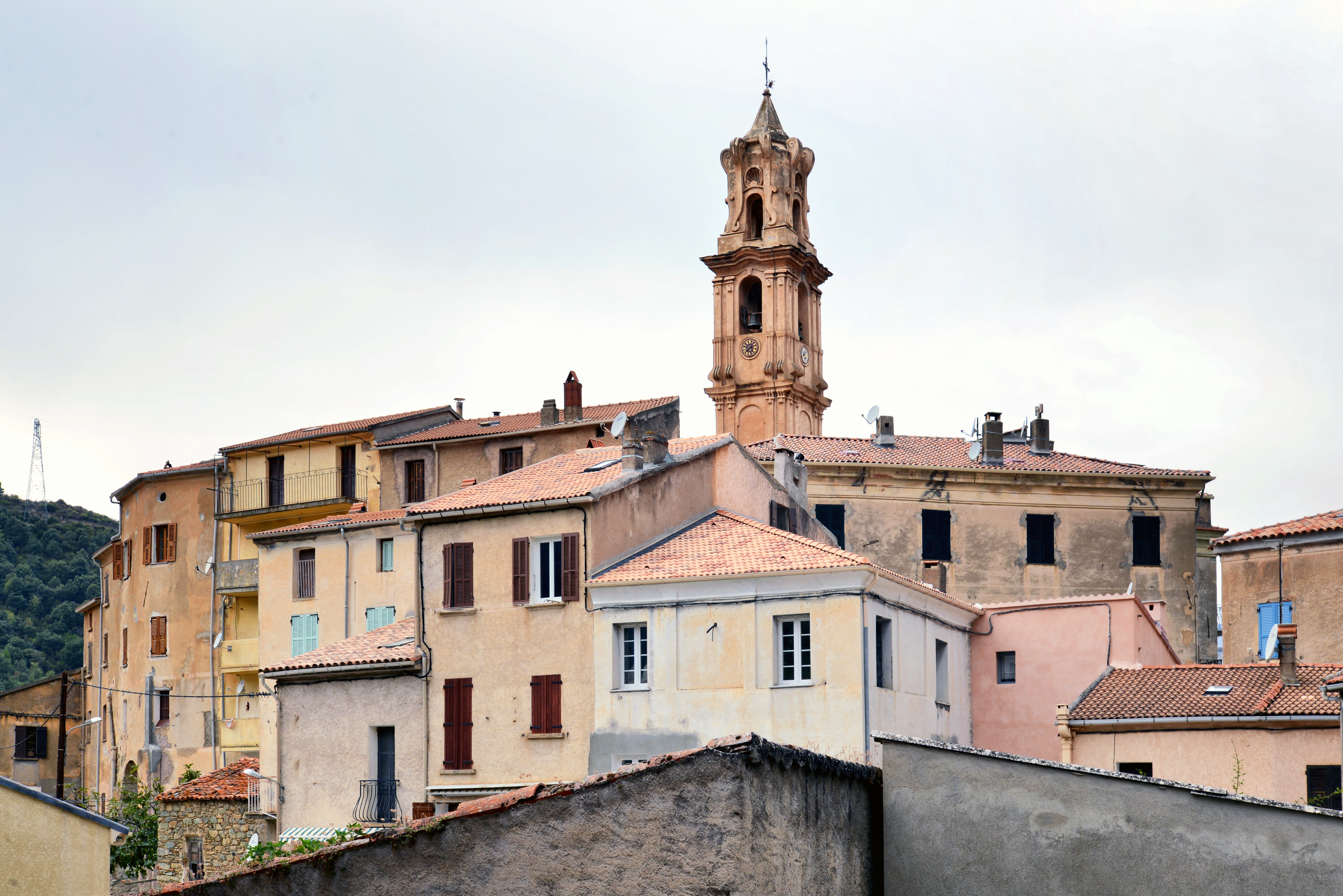 Omessa, Talcini (Corse) - Clocher à 5 étages de l'église Saint-André (Sant' Andrea) dominant les maisons alentour